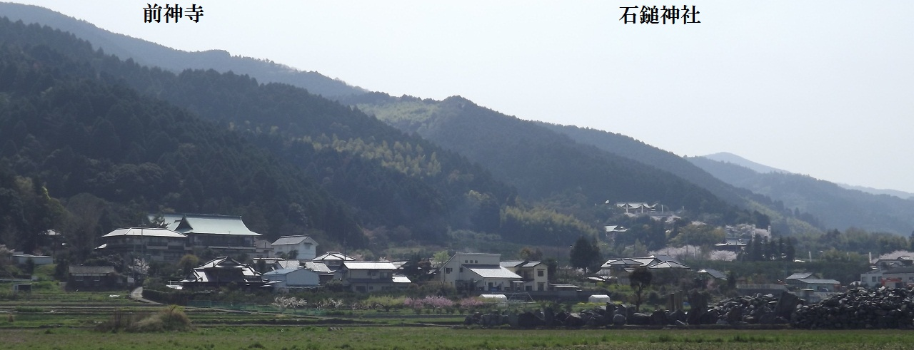 前神寺と石鎚神社